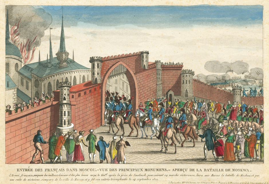 Entrée des Français dans Moscou ... le 14 septembre 1812, kolorierter Kupferstich. 30 x 45,5 cm. A Paris, chez Mme V.e Chereau.